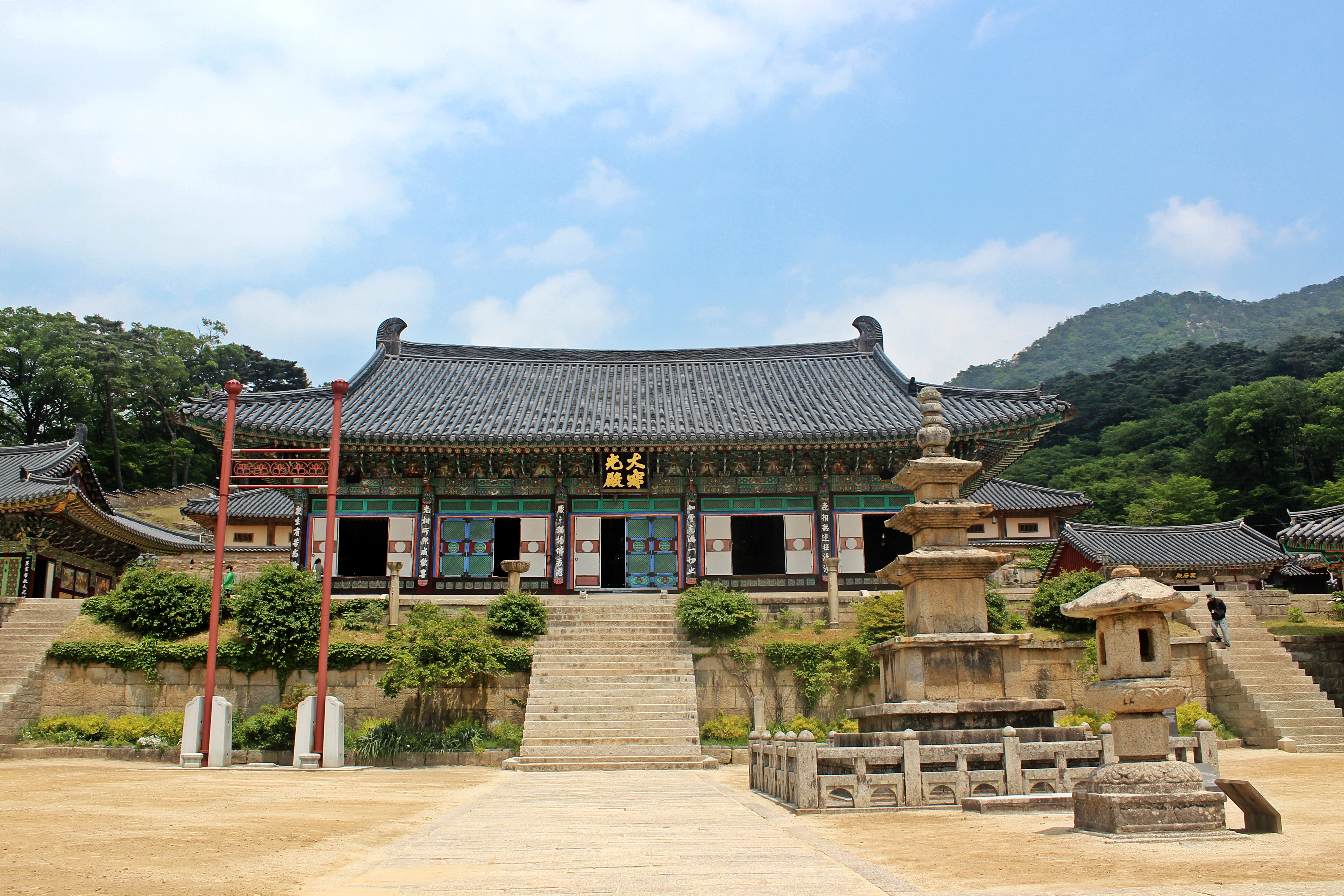 해인사 대적광적